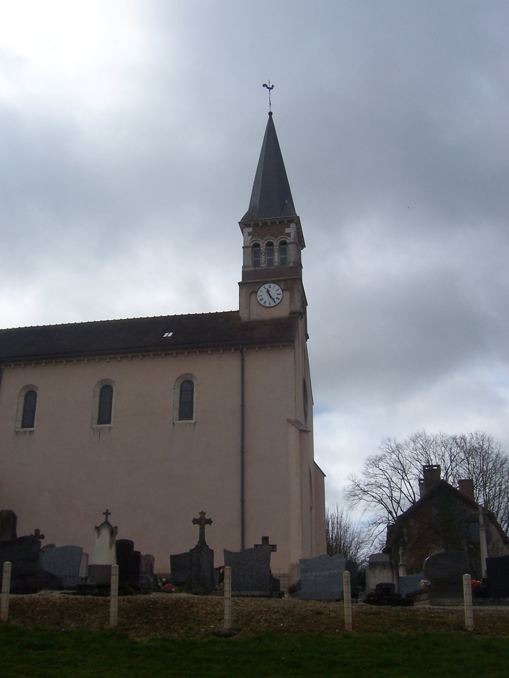 Eglise de Diconne